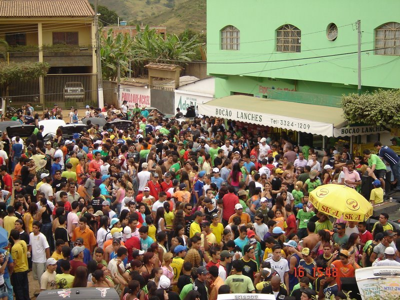 Foto da festa do arroz de vargem alegre